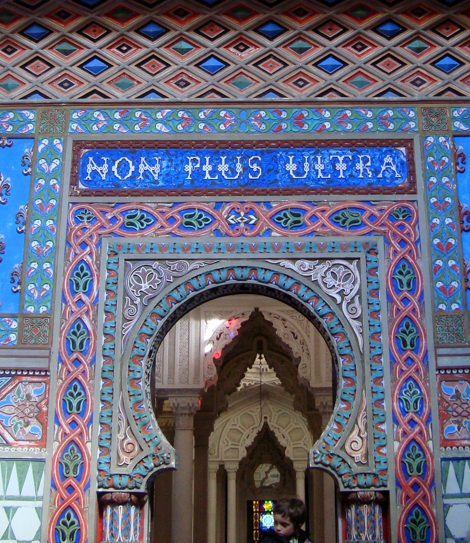 Sammezzano, salone delle colonne 11 non plus ultra